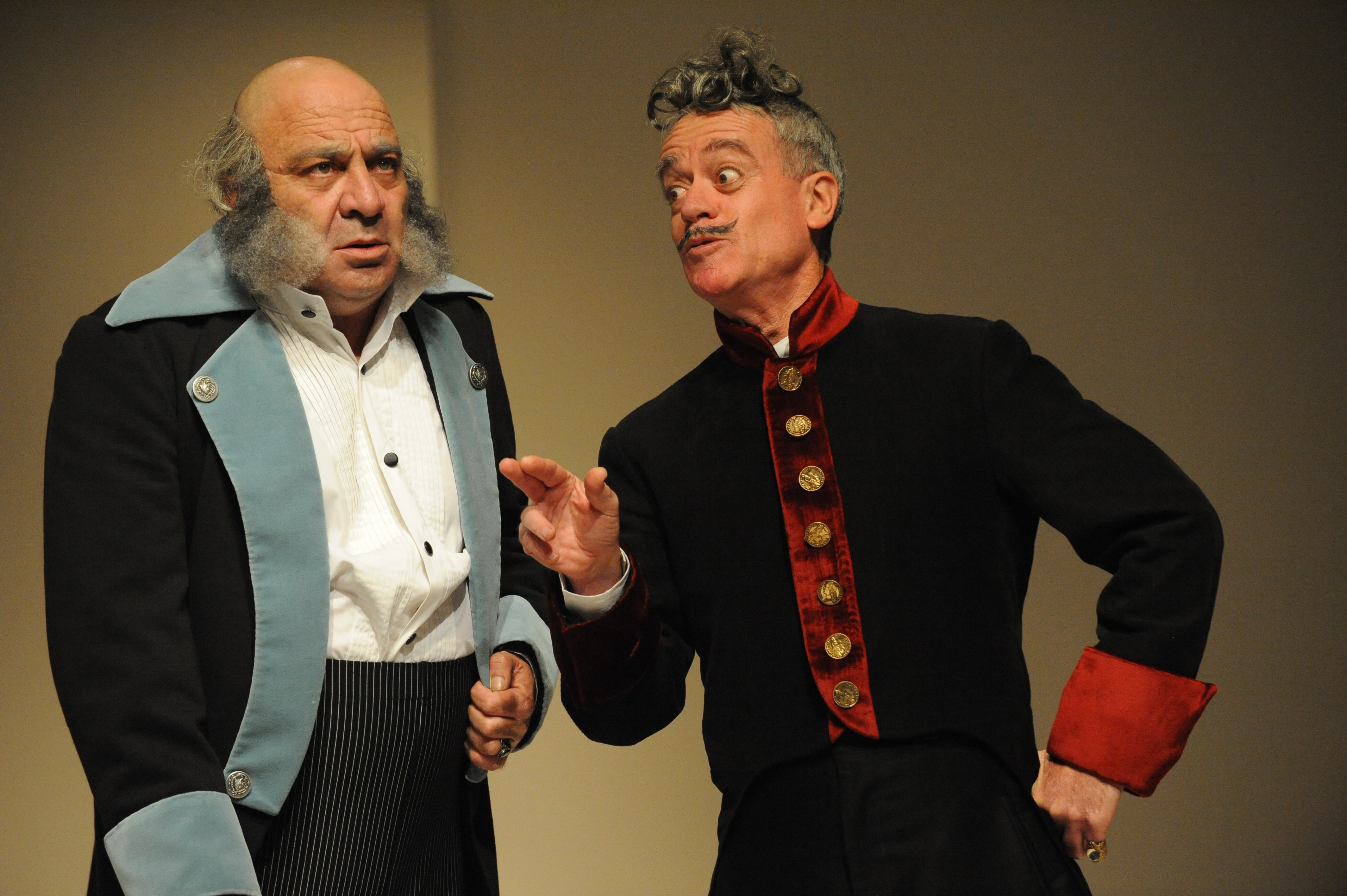 יהויכין פרידלנדר ואריה צ'רנר ב"תעלולי סקפן", בבימויו של אודי בן-משה, תיאטרון החאן, 2010